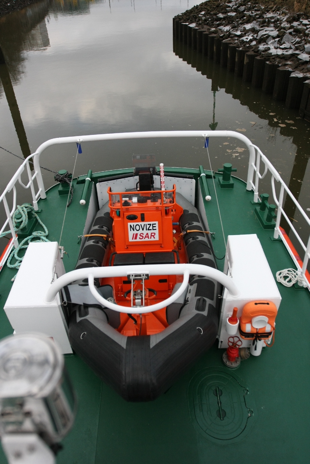 Arbeitsboot NOVIZE in der Heckwanne von SK Eiswette (II)